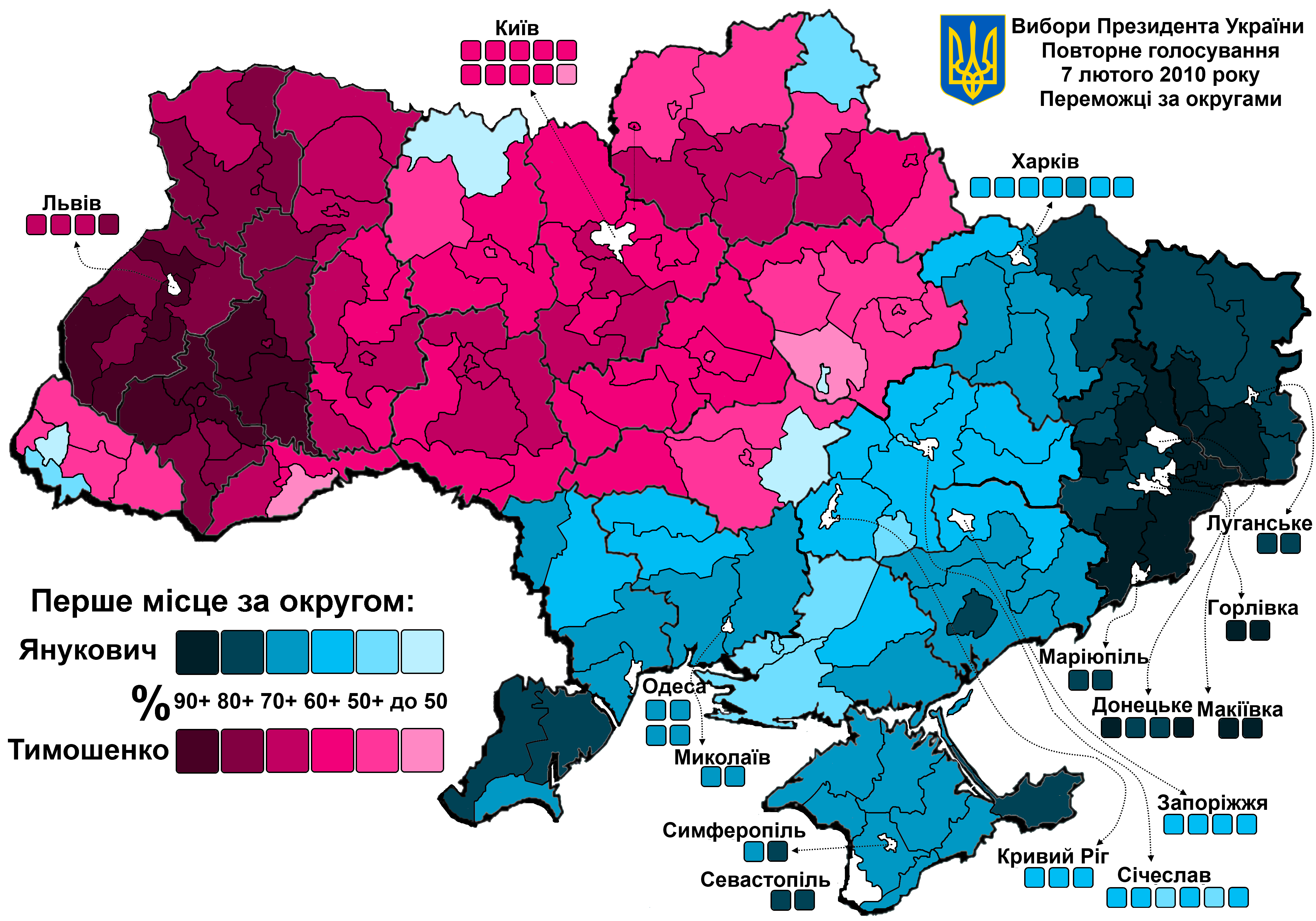 Другий тур за округами.